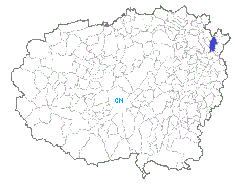 Posizione del comune nella provincia di Cuneo